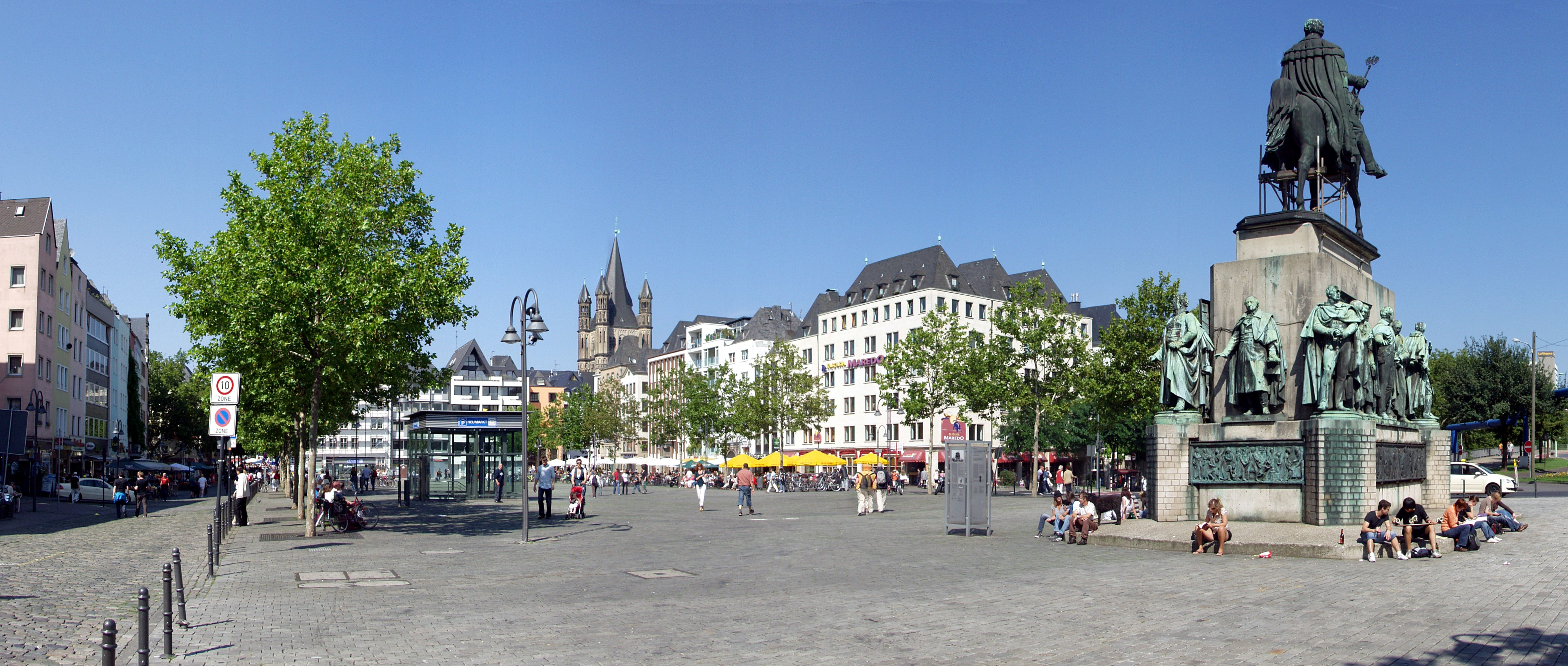 Heumarkt in Köln, Ansicht von Südwesten, mit dem Friedrich Wilhelm III.-Reiterstandbild.